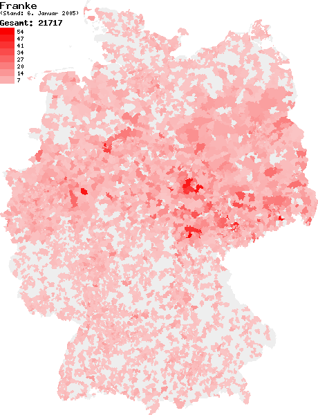 Verteilung des Nachnamens Franke in Deutschland nach dem Telefonbuch mit Stand vom 6. Januar 2005